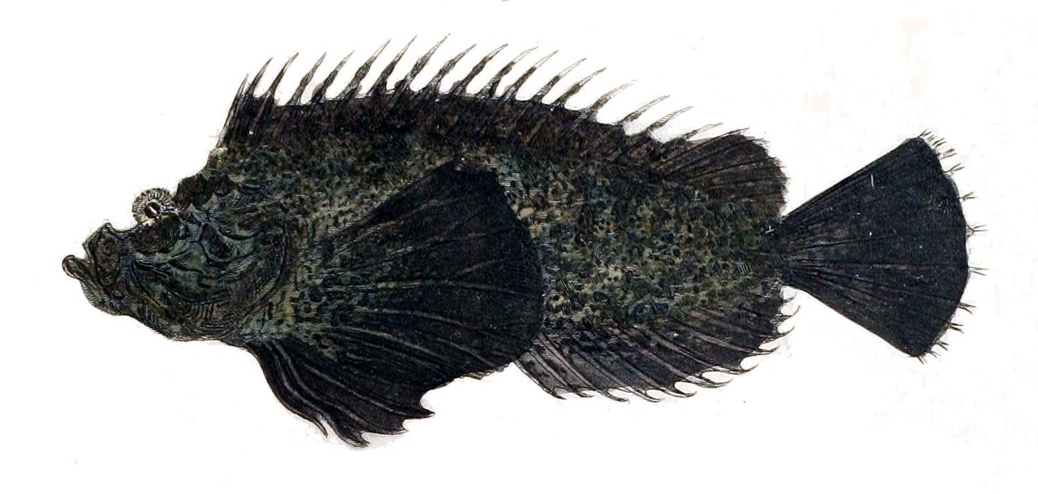 Inimicus japonicus